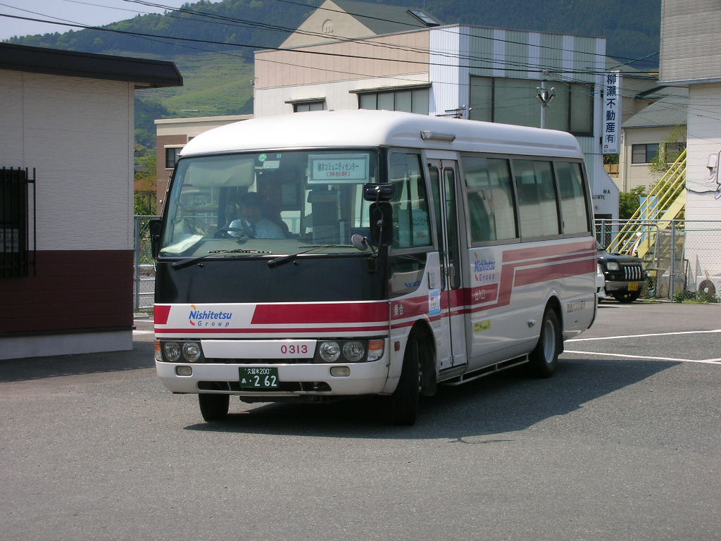 浮羽支線 杷木発着所